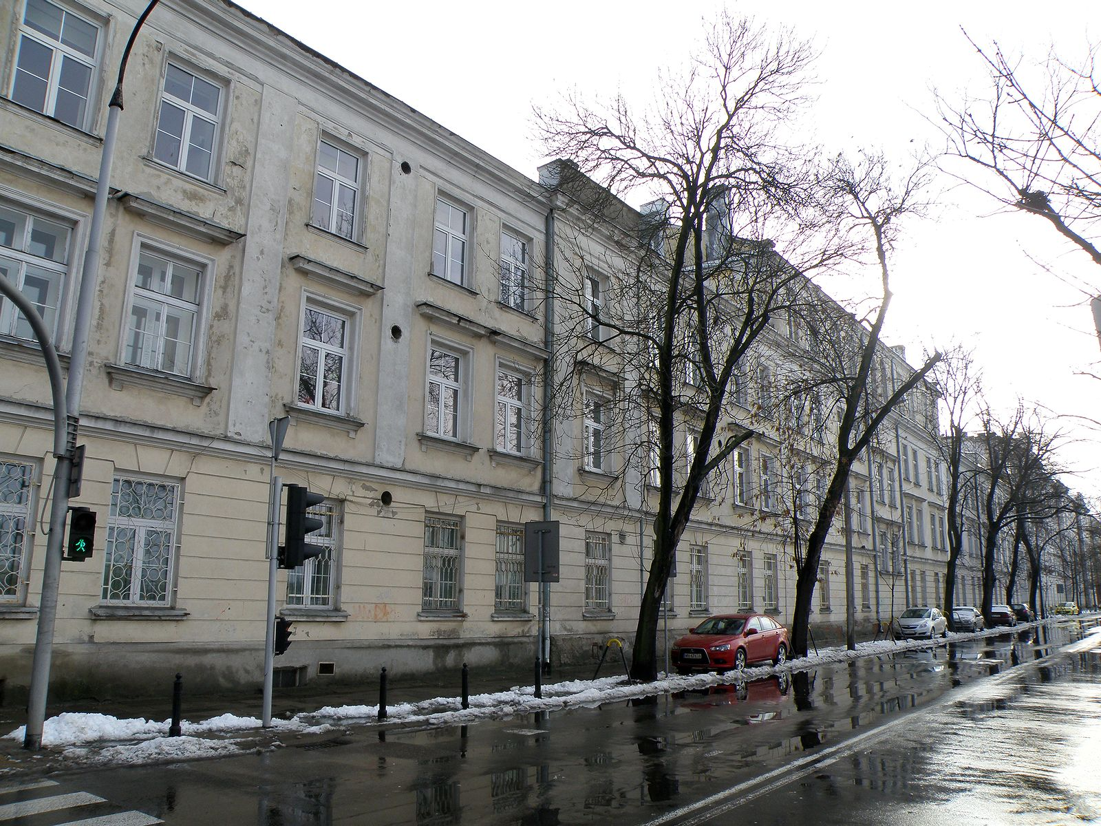 Wyższa Szkoła Wojenna, Ul Koszykowa 79 Fragment koszar 3 Lejb-Gwardyjskiej Brygady Artylerii z 3 Dywizji Piechoty Gwardii, 23 Korpus Armijny Imperium Rosyjskiego. W latach 1920-1939 Wyższa Szkoła Wojenna. Po wojnie studium wojskowe dla PW. Obecnie Szkoła Biznesu i część Wydziału Transportu Politechniki Warszawskiej.